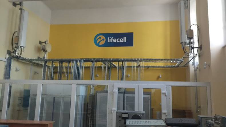 4g nulp